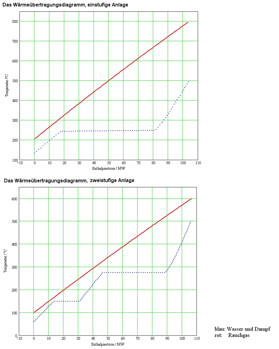 Wärmeübertragungsdiagramme